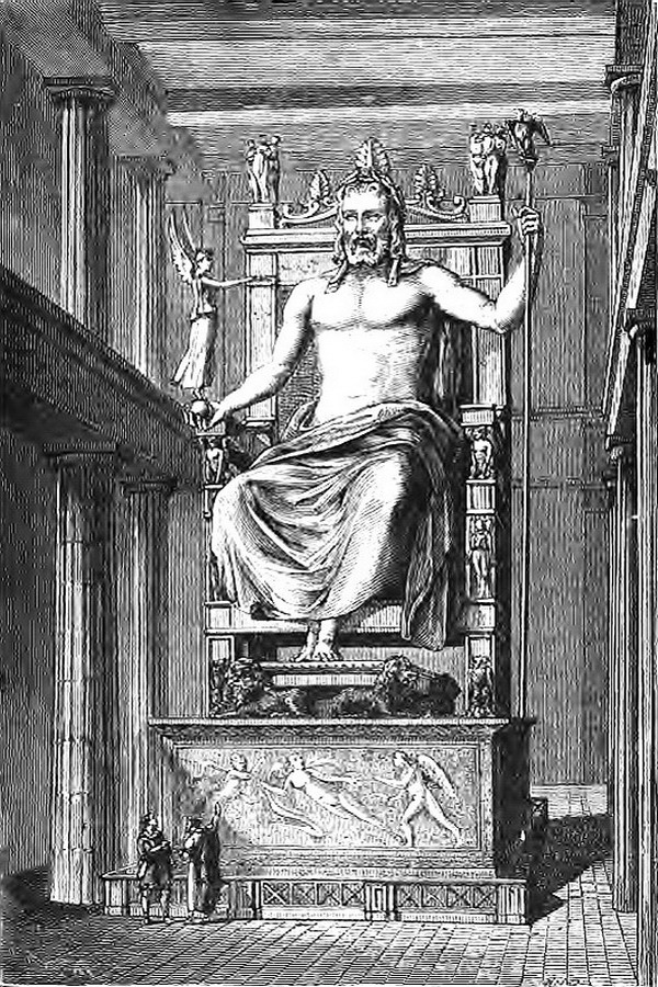 La statue de Zeus à Olympie, selon gravure du XIXè siècle